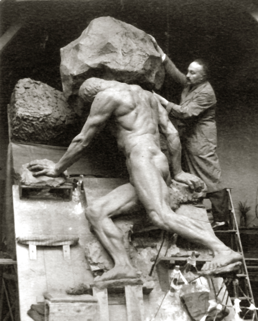 Le rocher de Sisyphe et son sculpteur Alix Marquet 1933